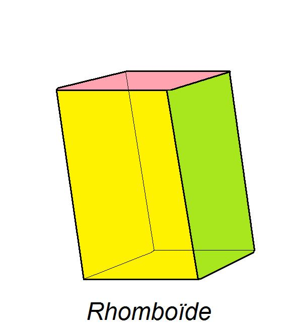 Rhomboïde